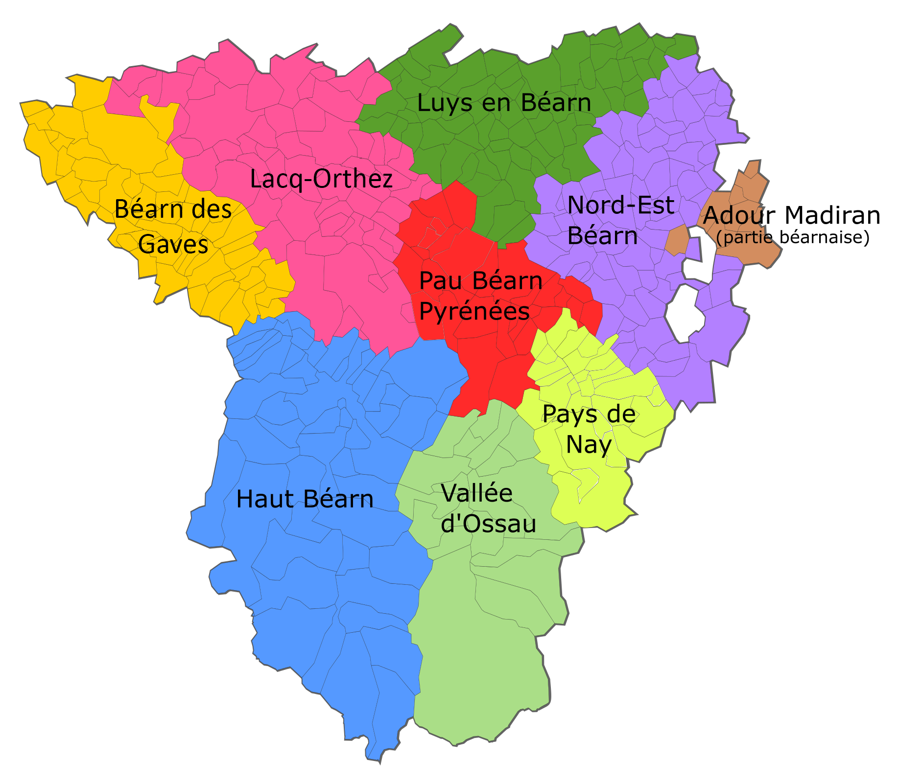 Intercommunalités dans le Béarn en 2018